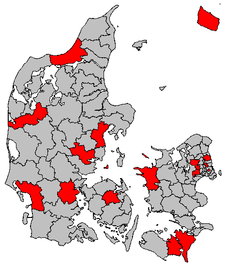 Kommuner hvori pædagoger i BUPL strejkede i foråret og sommeren 2008